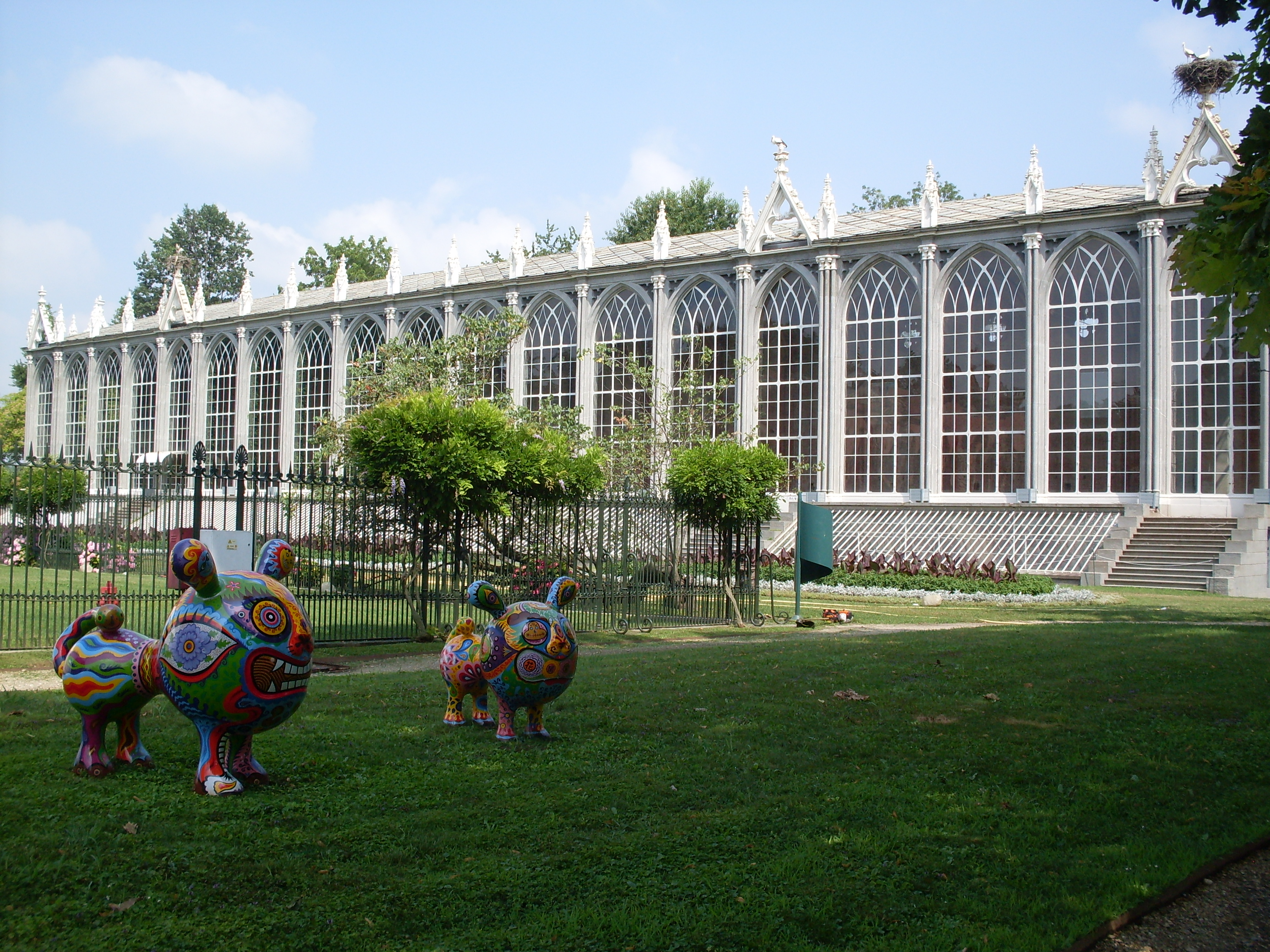 le serre neogotiche della Margaria del Castello Reale di Racconigi